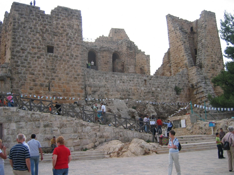 Entrance to Ajlun castle